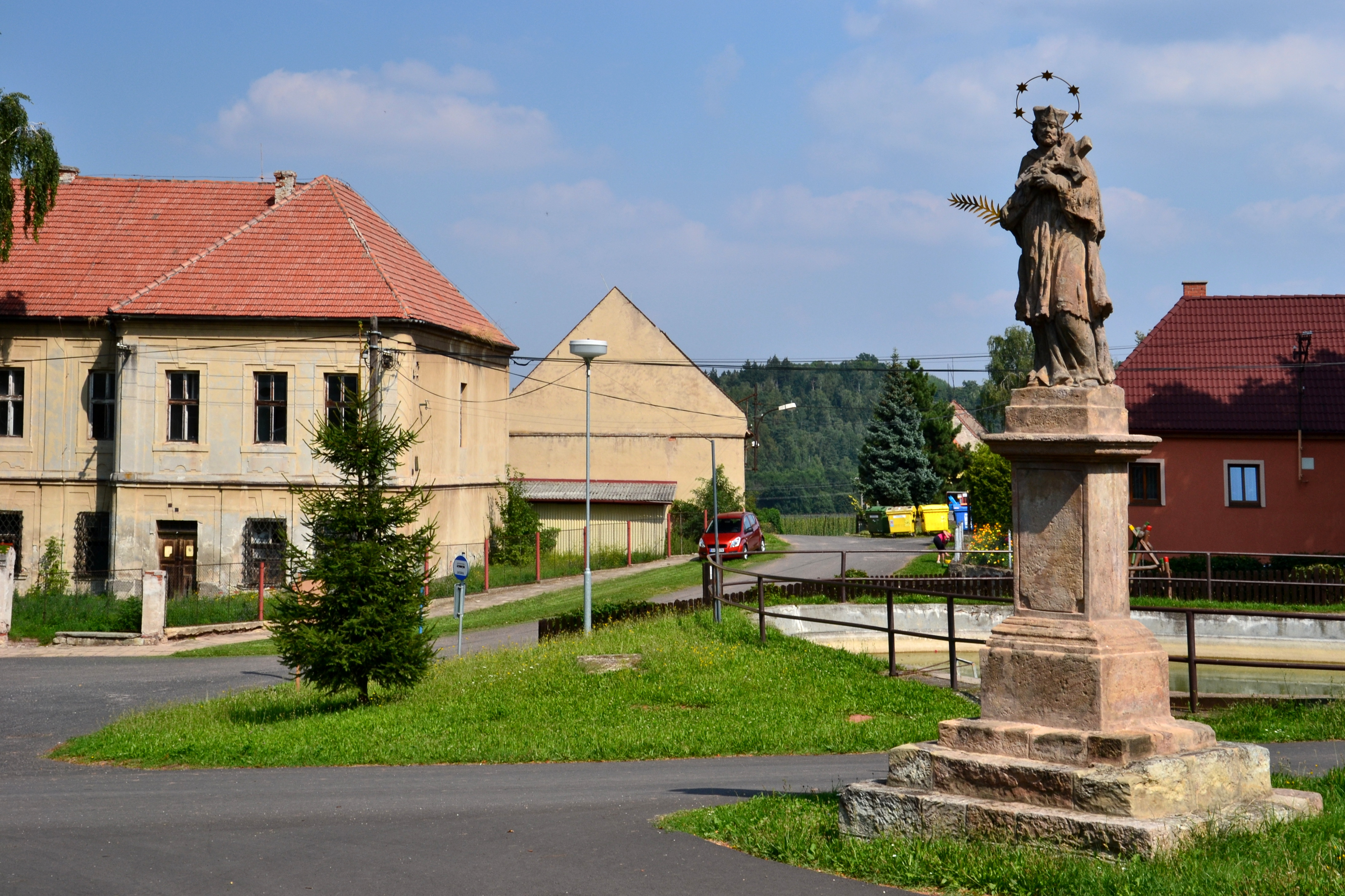 Socha sv. Jana Nepomuckého (Želeč), Želeč